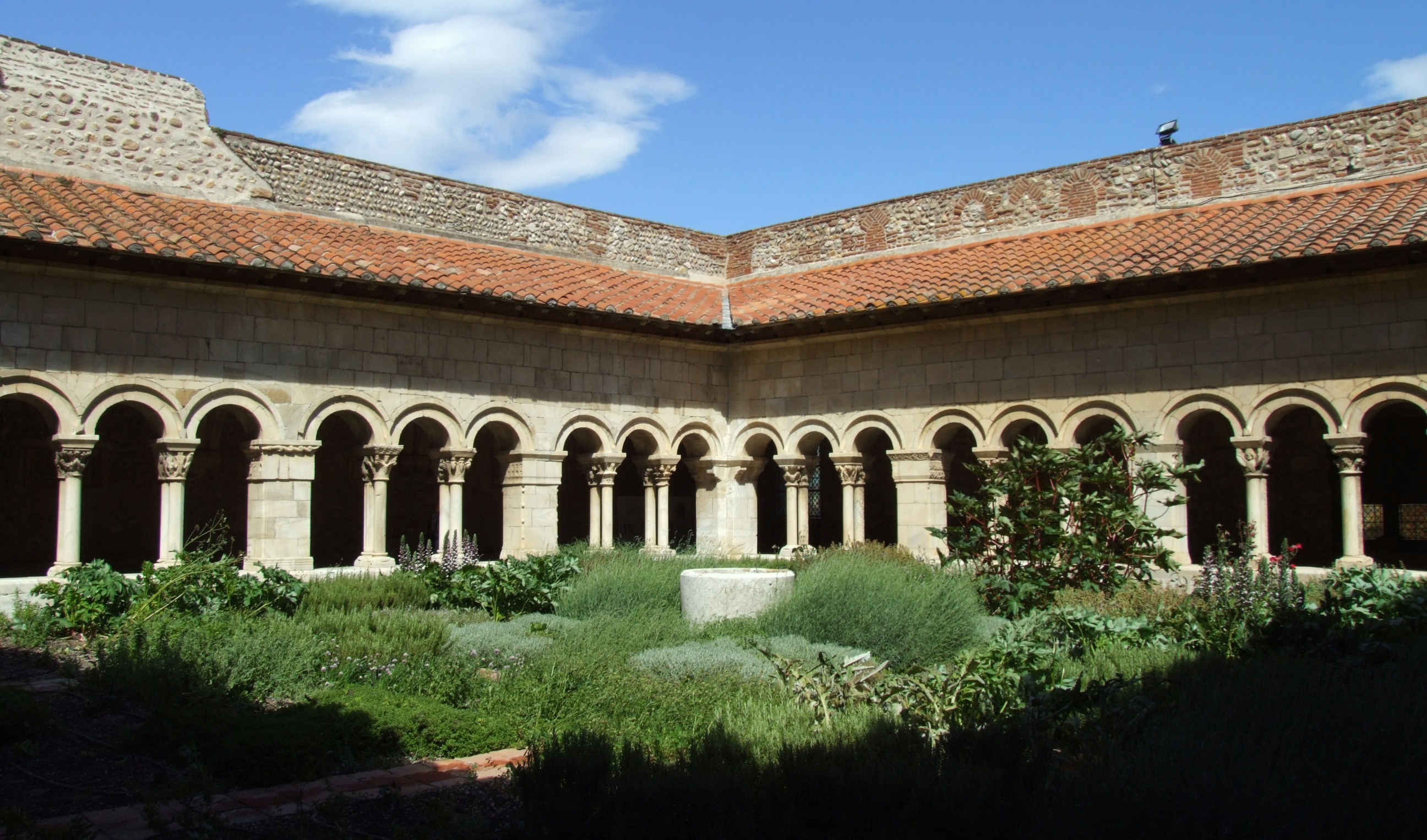 Elne - Cloître